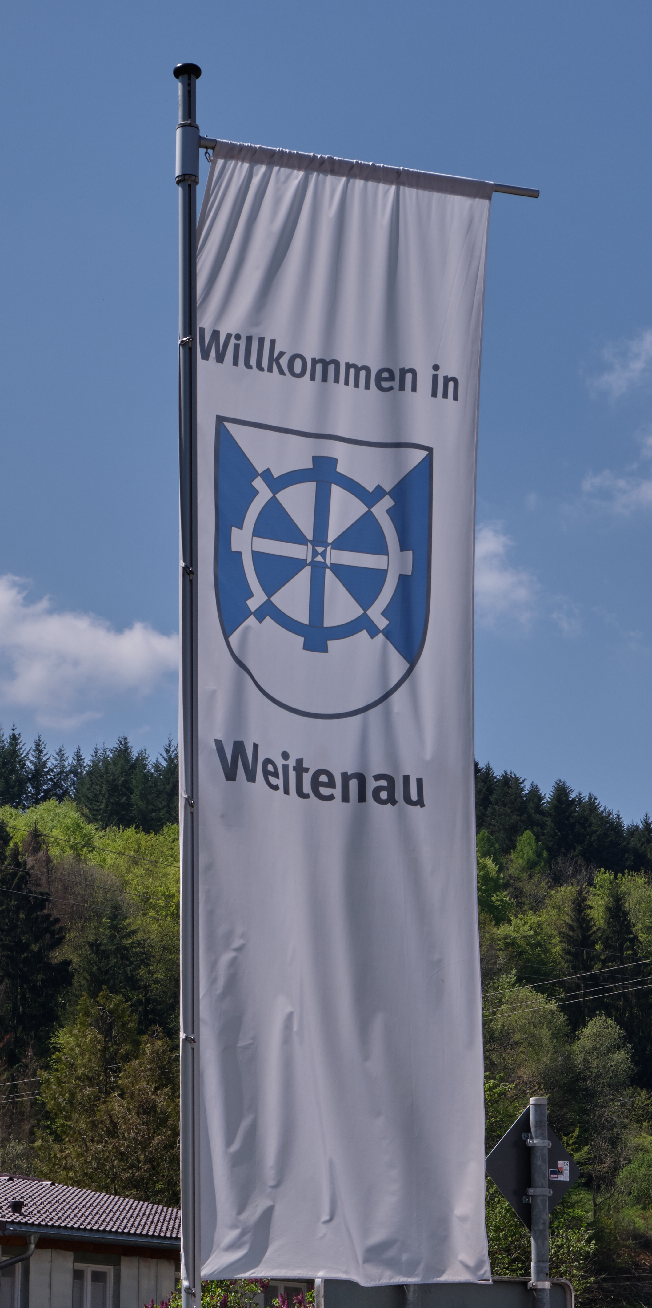 Weitenau: Flagge mit Ortswappen